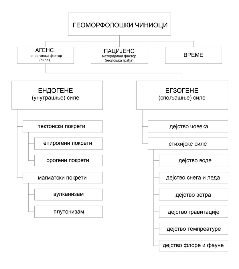 Klasifikacija geomorfoloških agenasa